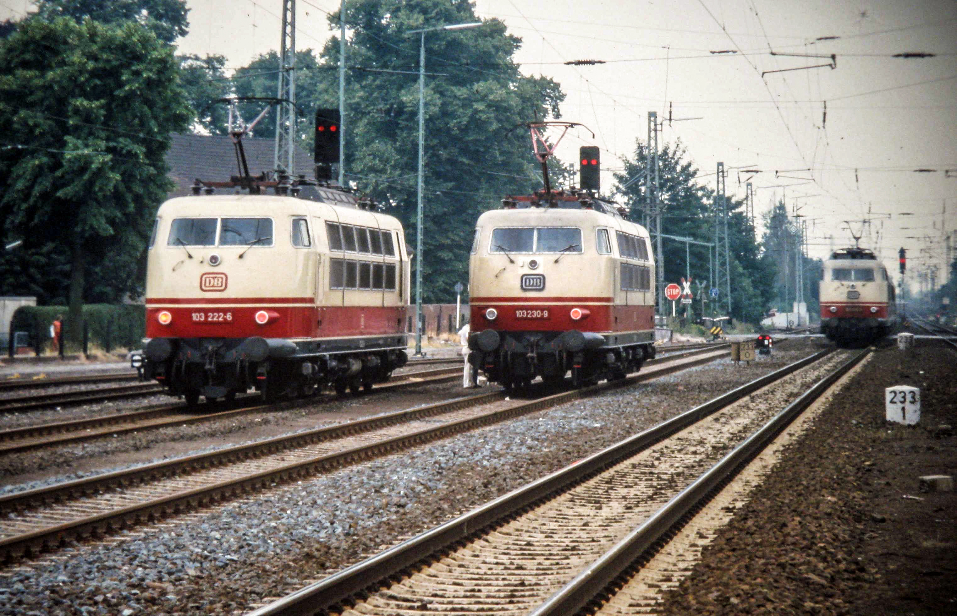 DB Baureihe 103 in Bremen-Hemelingen